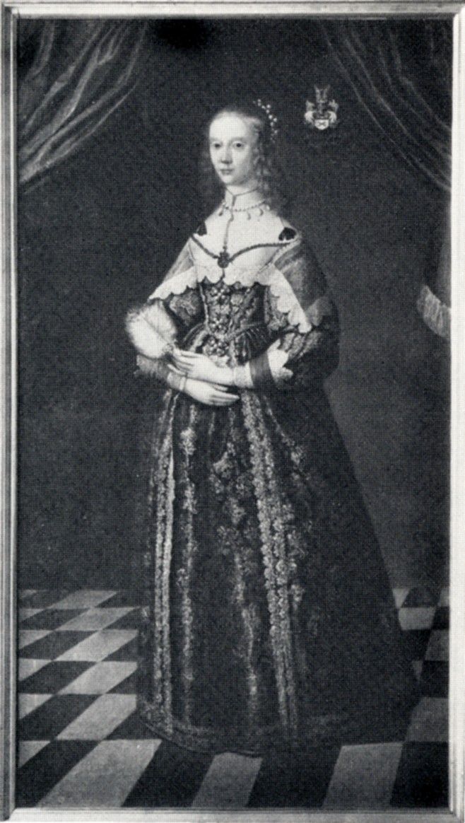 Maria Sofia Oxenstierna (1627-1694)